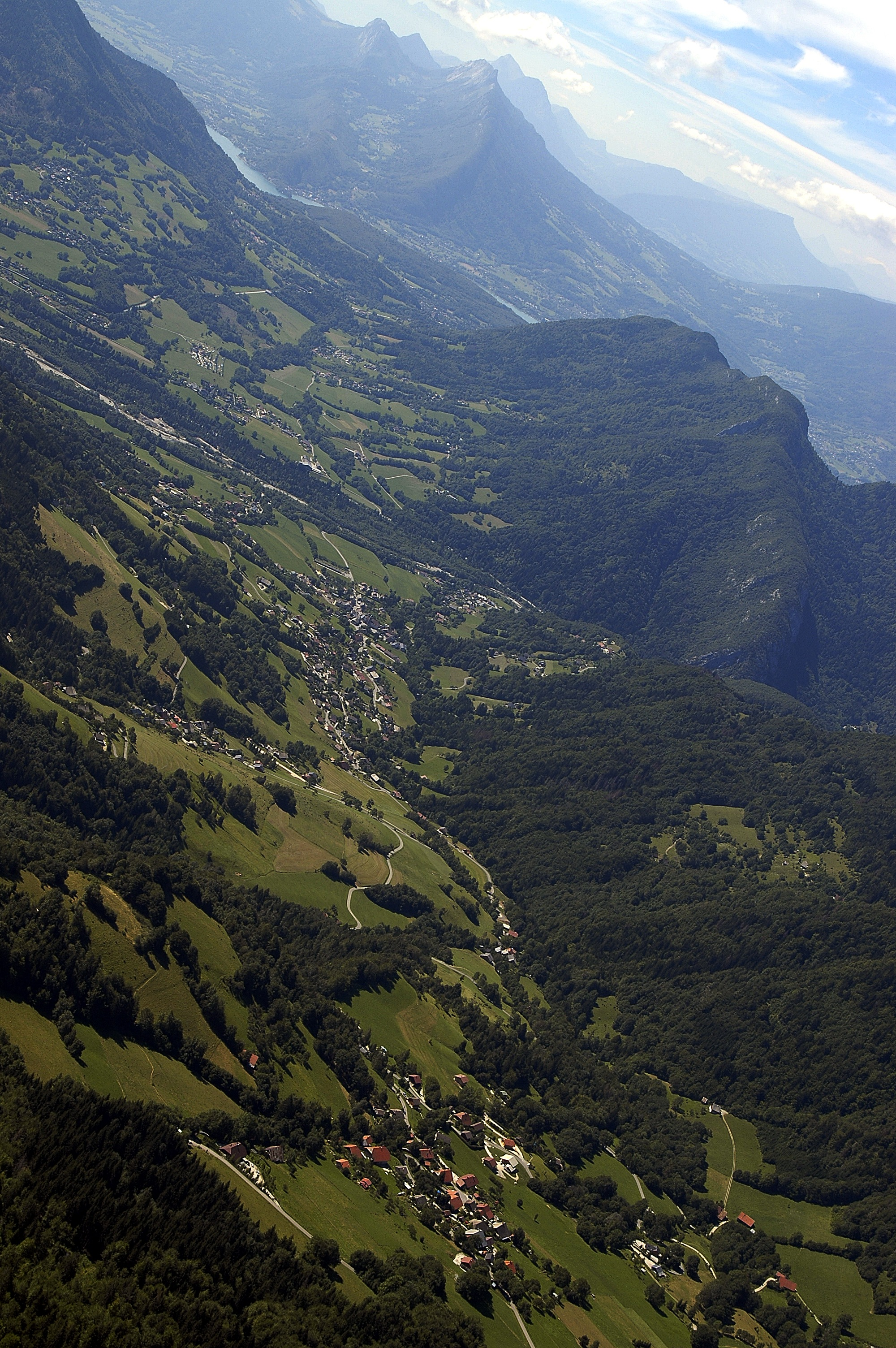 La vallée de Dingy-Saint-Clair vue depuis le Parmelan (1832 m). La vallée est barrée par le torrent du Fier qu'on voit partir dans le défilé de Dingy-Saint-Clair pour pénétrer sur la commune d'Annecy-le-Vieux. Sur la droite après le défilé de Dingy-Saint-Clair, la crête du Mont Baret (1243 m) et le col des Contrebandiers (1054 m). Tout au fond, dans un même alignement, on aperçoit le col de Bluffy, le roc de Chère (559 m), le Lac d'Annecy et l'élégante courbe de la montagne d'Entrevernes et sa suite, le Roc des Bœufs (1754 m). Les montagnes du fond font partie du massif des Bauges. En bas et à gauche de la montagne d'Entrevernes, on aperçoit la commune de Duingt et son romantique château de Ruffy, à droite de la montagne d'Entrevernes, l'étroite vallée d'Entrevernes, limitée à droite par la crête du Taillefer (870 m).